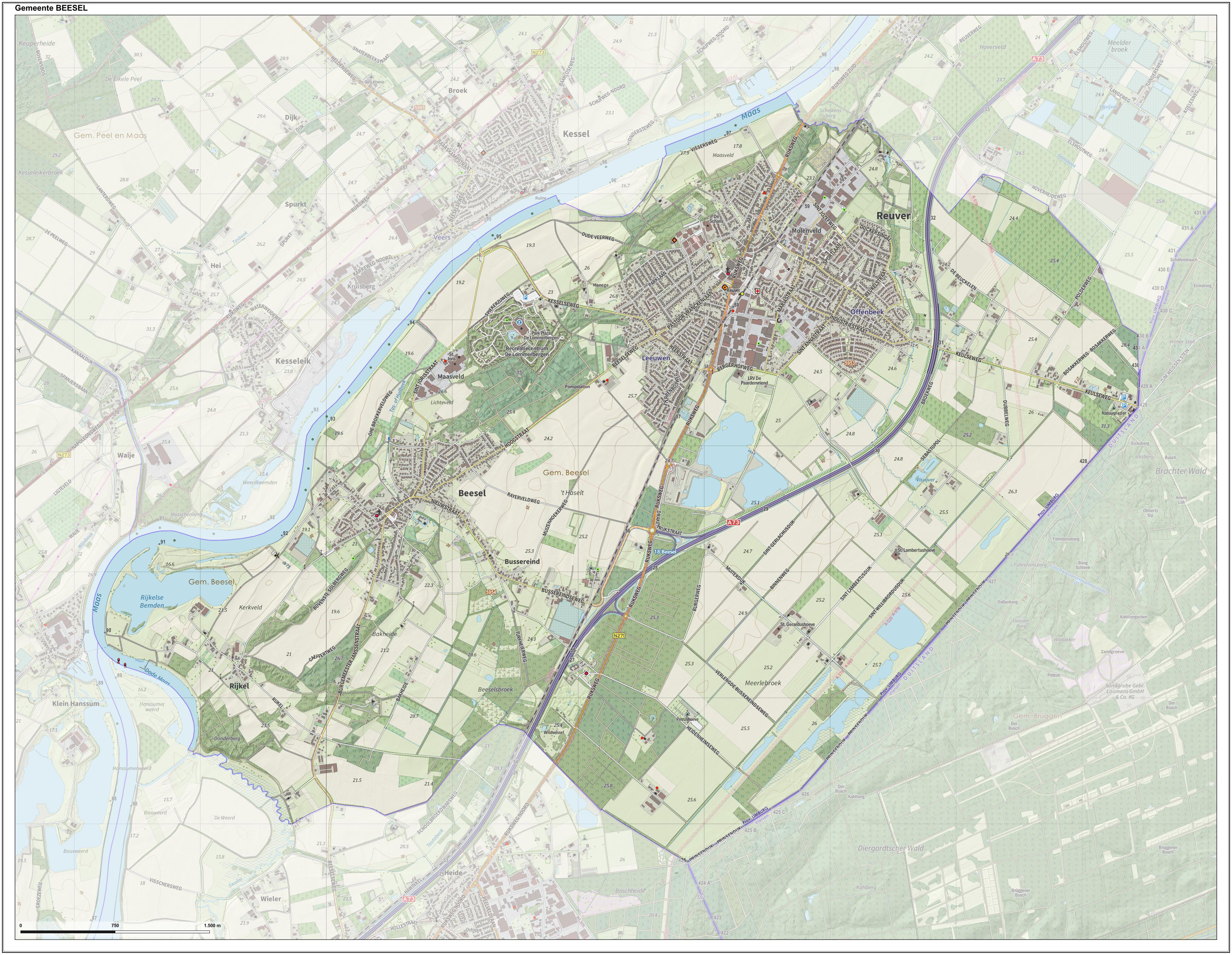 Topografische gemeentekaart. Resolutie: 400 pixels/km. Kaartbeeld samengesteld uit de open geodata van de Top10NL en Top25namen (Kadaster), Creative Commons-BY licentie. Gebouwvlakken uit open geodata BAG extract. Wegen uit de OpenStreetMap, OpenStreetMap community. Reliëfschaduw uit de Actuele Hoogtekaart AHN2. Samenstelling en kleurenschema: Jan-Willem van Aalst, met QGIS. Zie ook de Legenda.